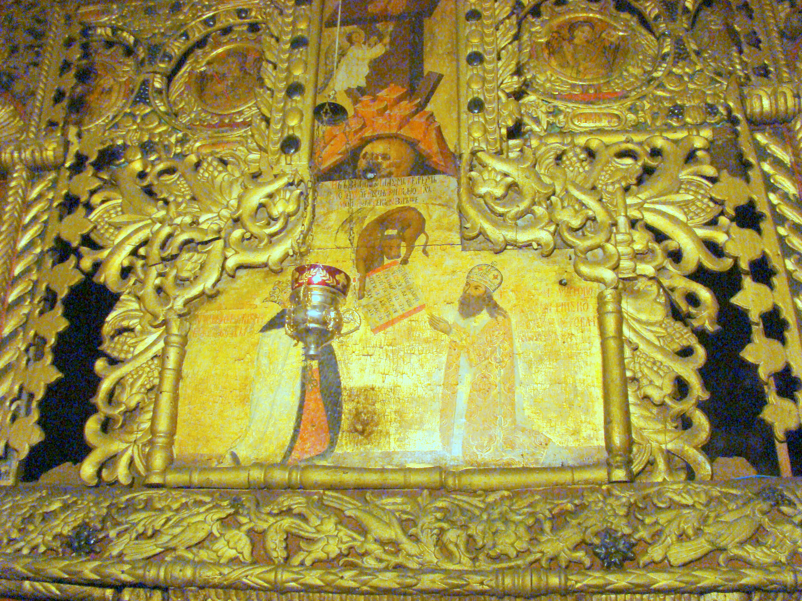 Ansamblul schitului Crasna, județul Gorj